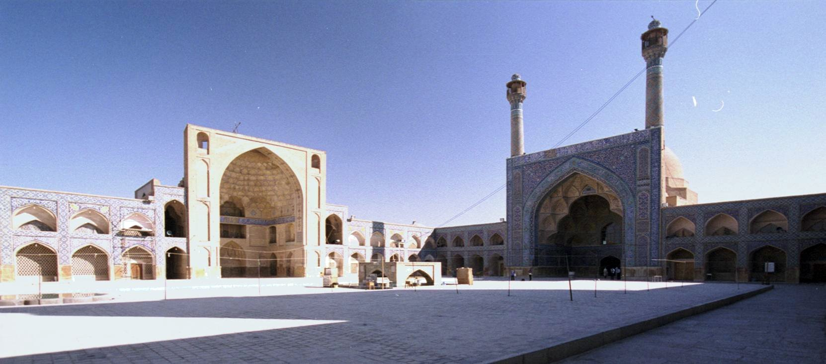 Jameh Mosque (Friday Mosque), Isfahan